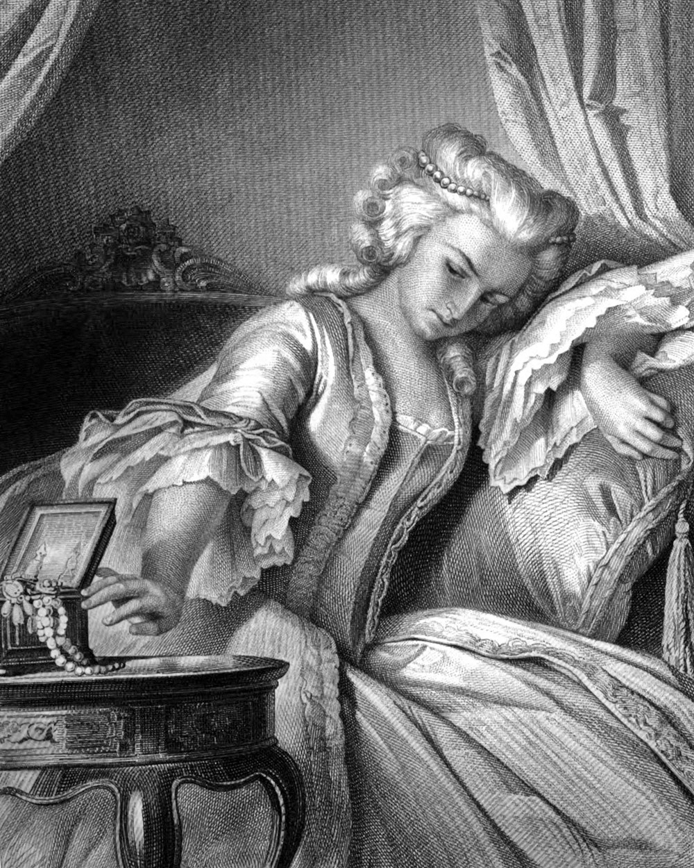 Lady Milford aus Friedrich Schillers Drama Kabale und Liebe, als Stahlstich gestochen um 1859 nach einer Zeichnung von Arthur von Ramberg